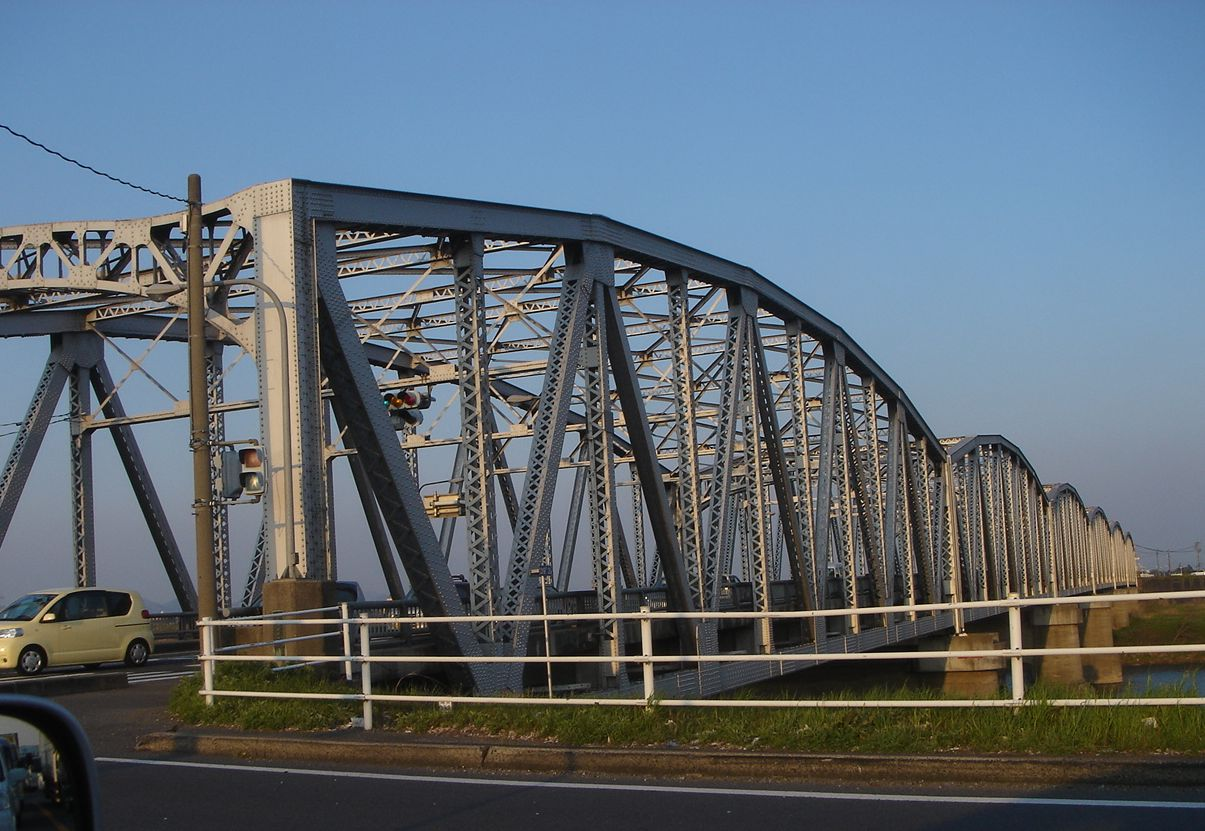 Nagara-Ohashi(長良大橋),Ogaki,Gifu,Japan(岐阜県大垣市)で南西より撮影